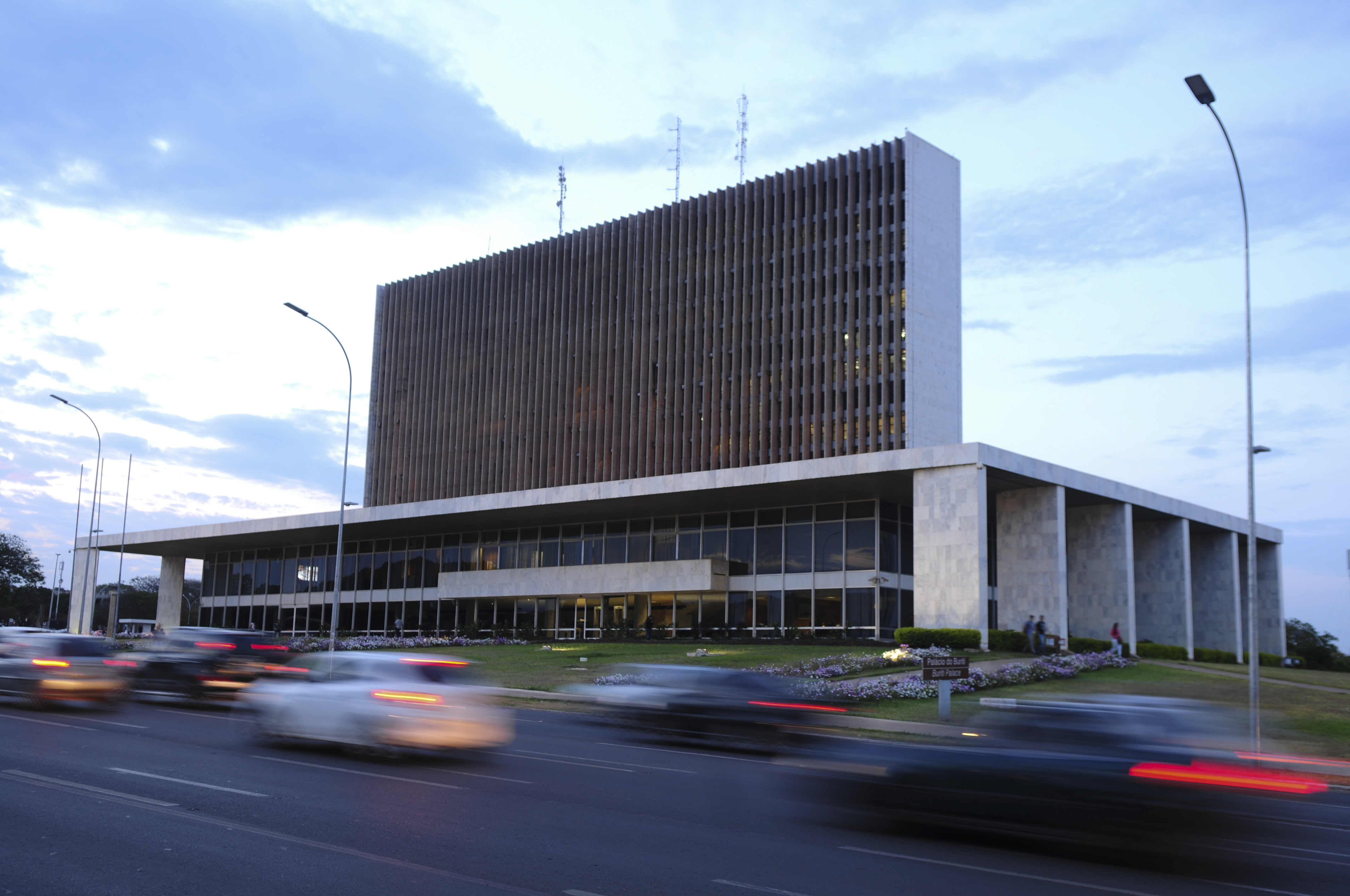 Palácio do Buriti, Plano Piloto, Brasília, DF, Brasil 4/10/2017 Foto: Pedro Ventura/Agência Brasília. As grades de proteção em volta do Palácio do Buriti foram retiradas nesta quarta-feira (4). A medida já vinha sendo discutida havia alguns meses dentro do próprio Executivo, entre a Casa Militar e a Secretaria da Segurança Pública e da Paz Social. Medida devolve à comunidade uma paisagem limpa, integrada ao conjunto da Praça do Buriti, sem obstáculos para os pedestres.